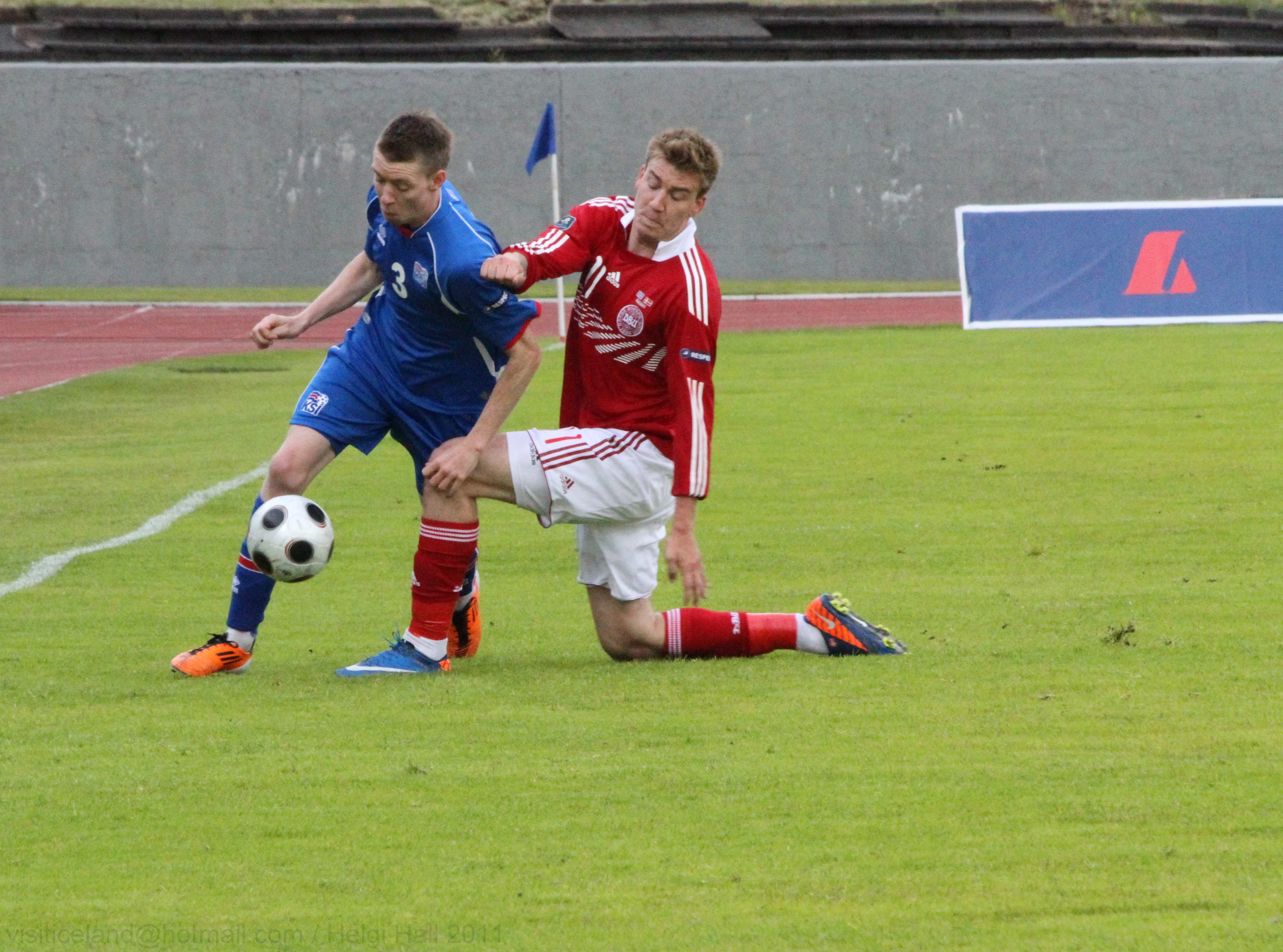 Iceland vs Denmark 4.6.2011